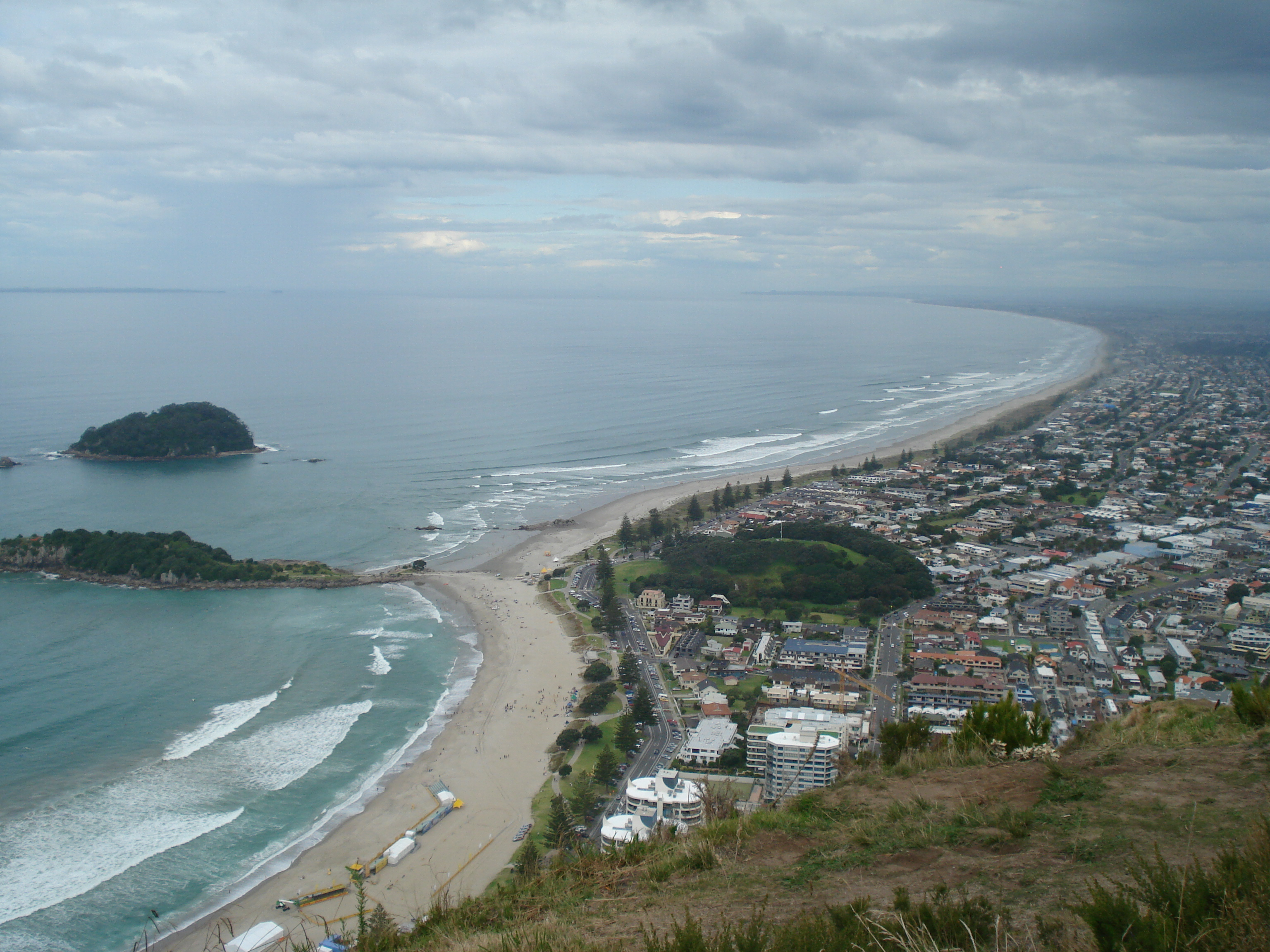 Mnt ManganuiMnt Manganui